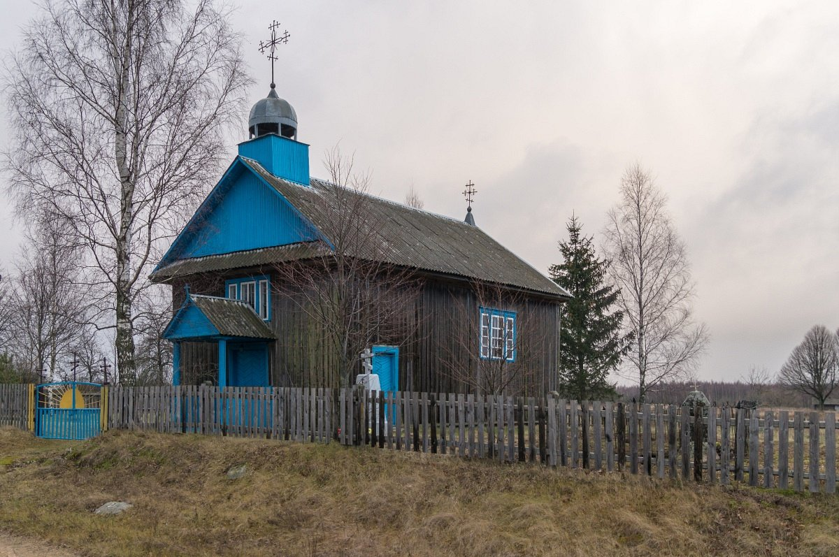 Вардамічы. Георгіеўская царква